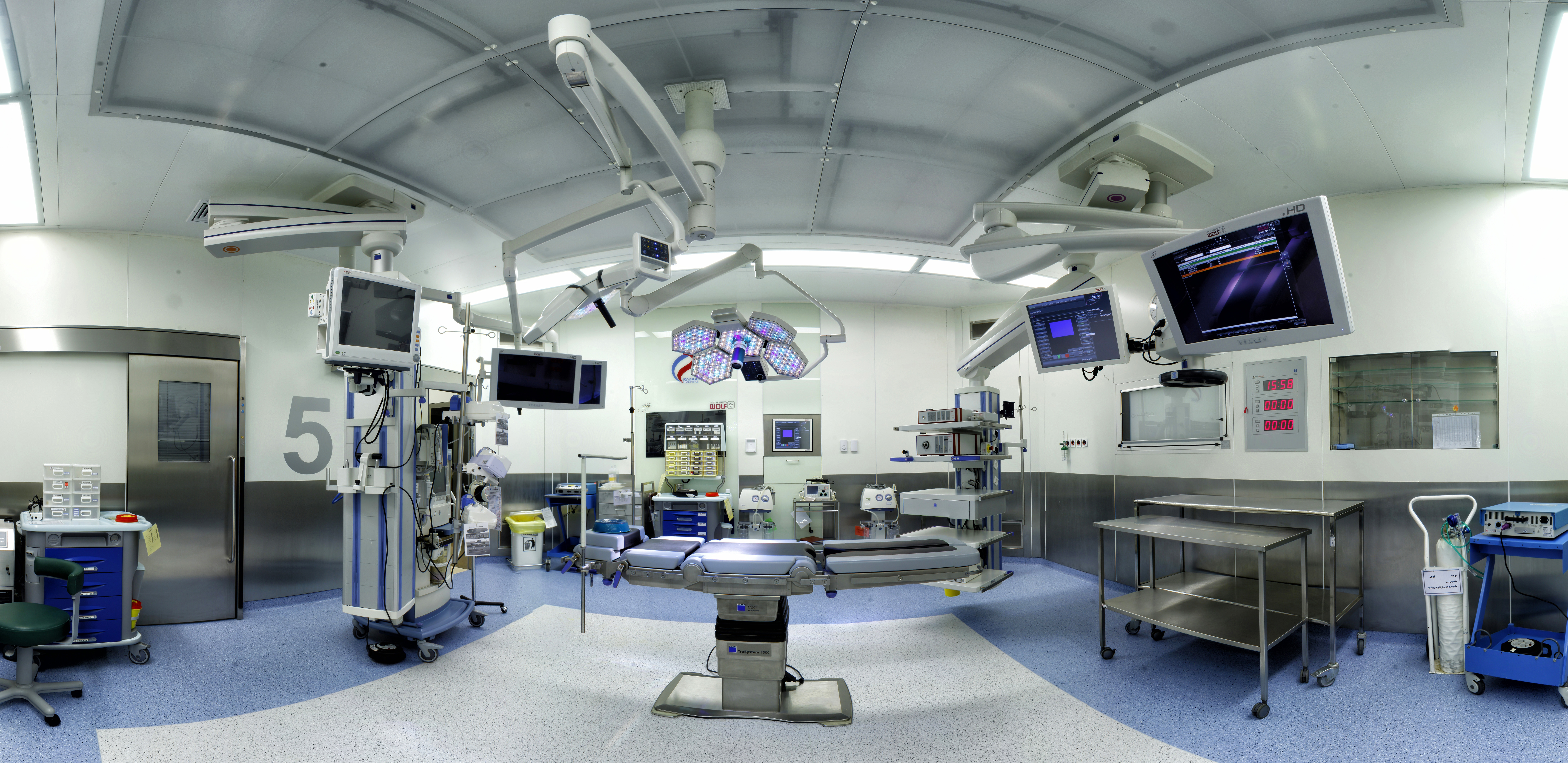 Operating room of razavi hospital